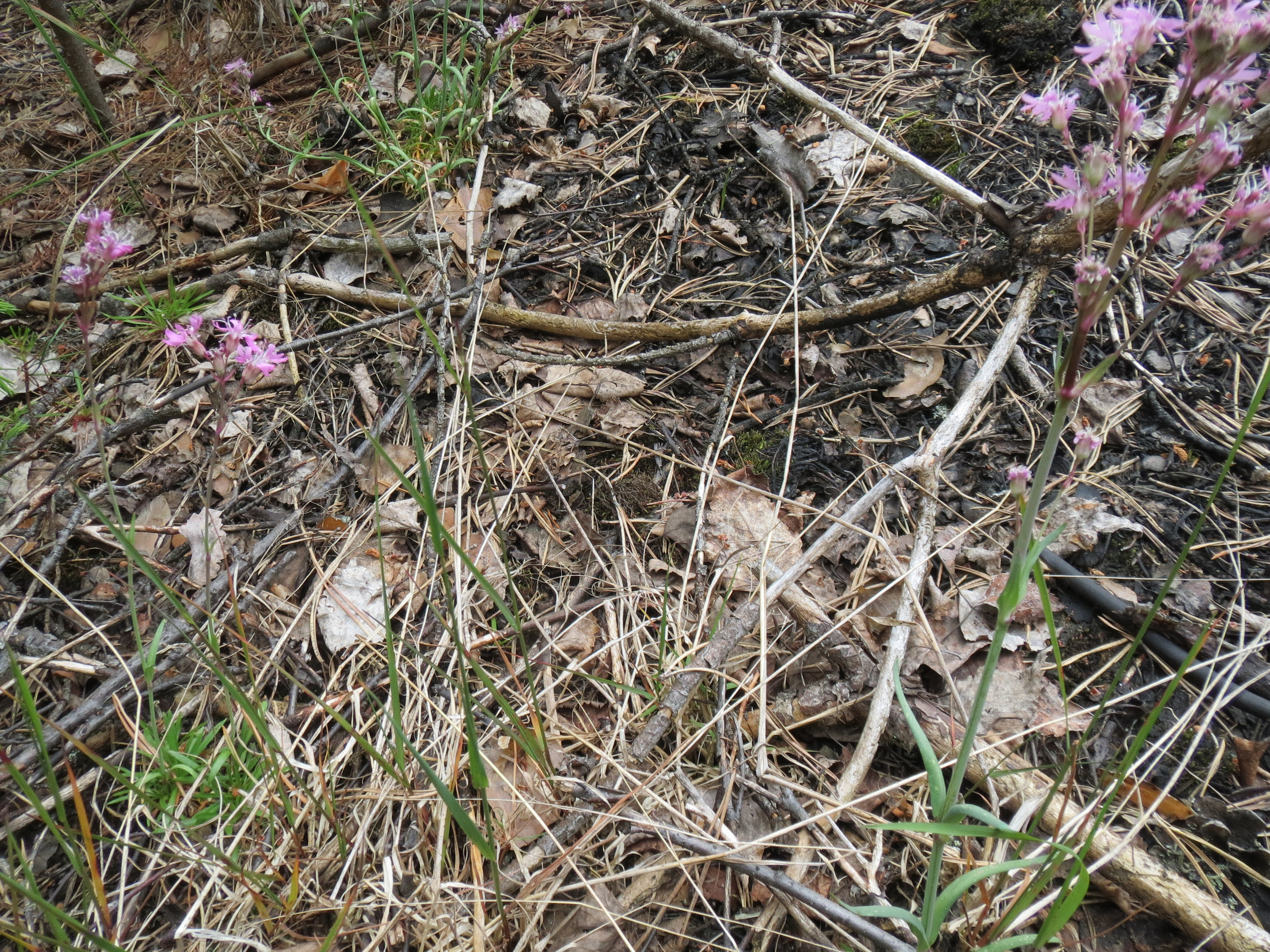 Serpentiinipikkutervakko kasvupaikallaan Kajaani, Suomi